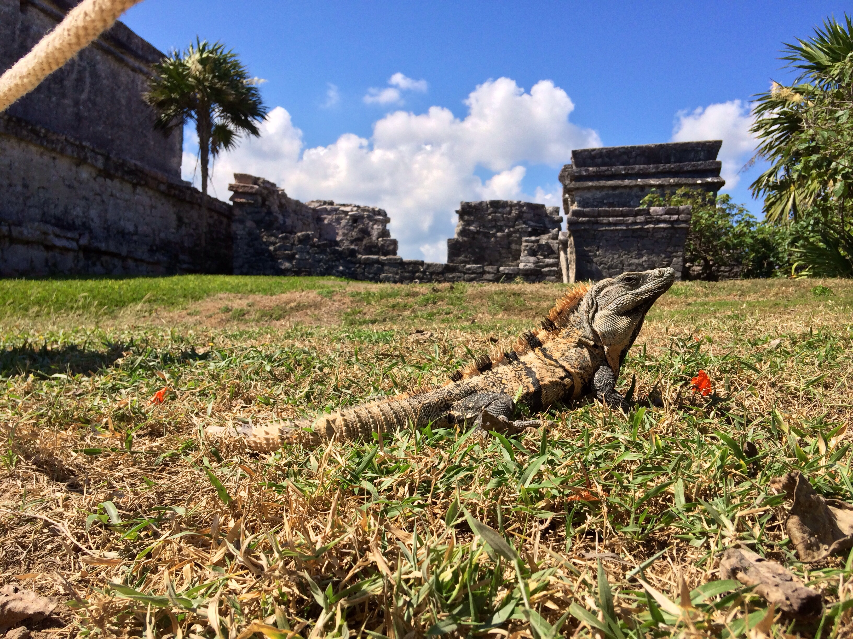 Iguana negra del golfo